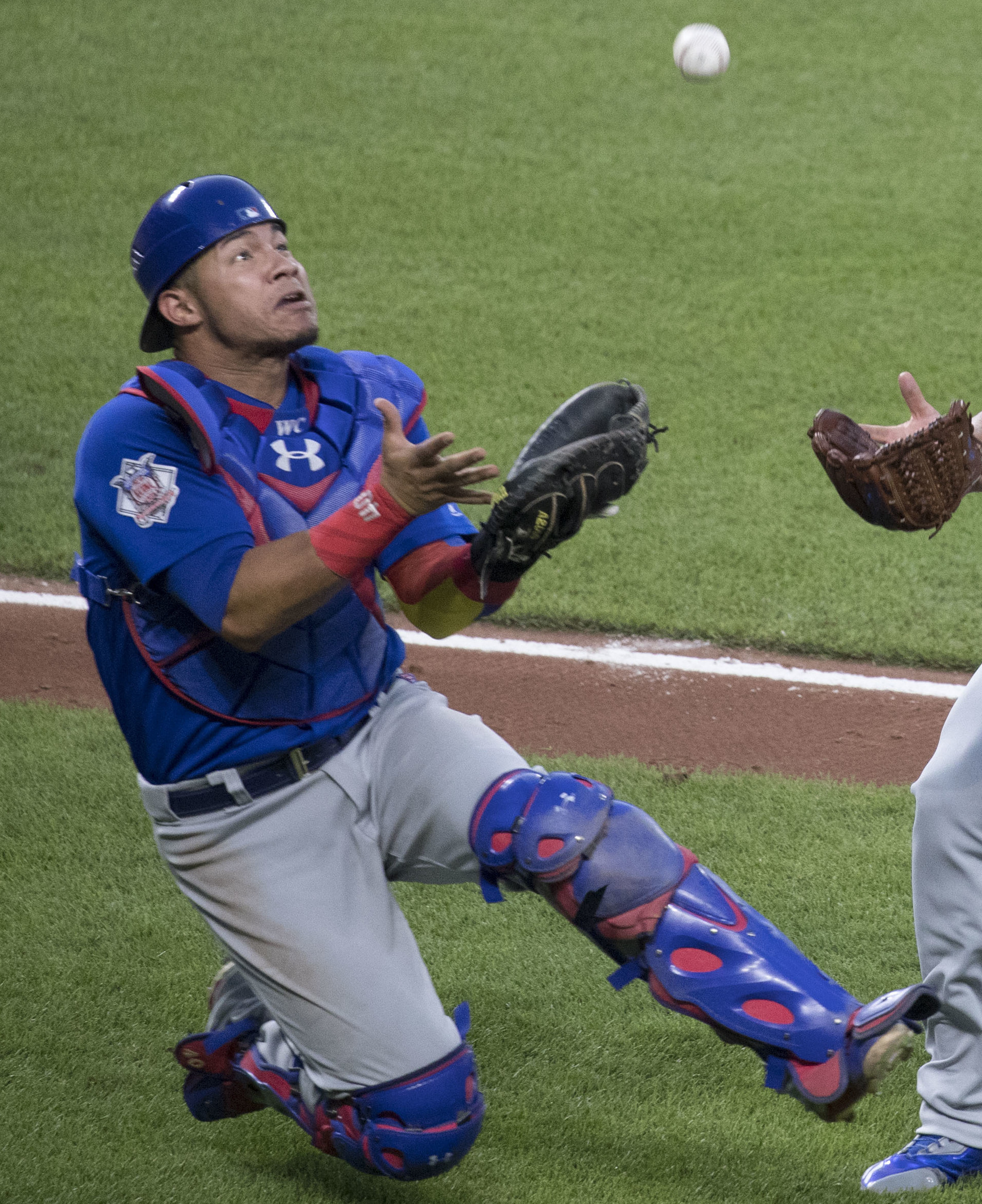 Cubs at Orioles 7/15/17